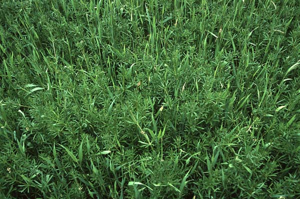 Klettenlabkraut in Weizen (Original text: Klettenlabkraut in Weizen)